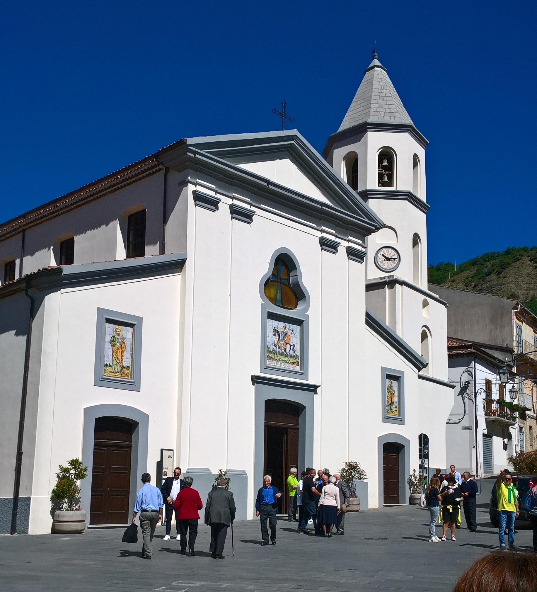 Chiesa San Costantino il Grande, San Costantino Alabnese, Potenza, Kalabrien